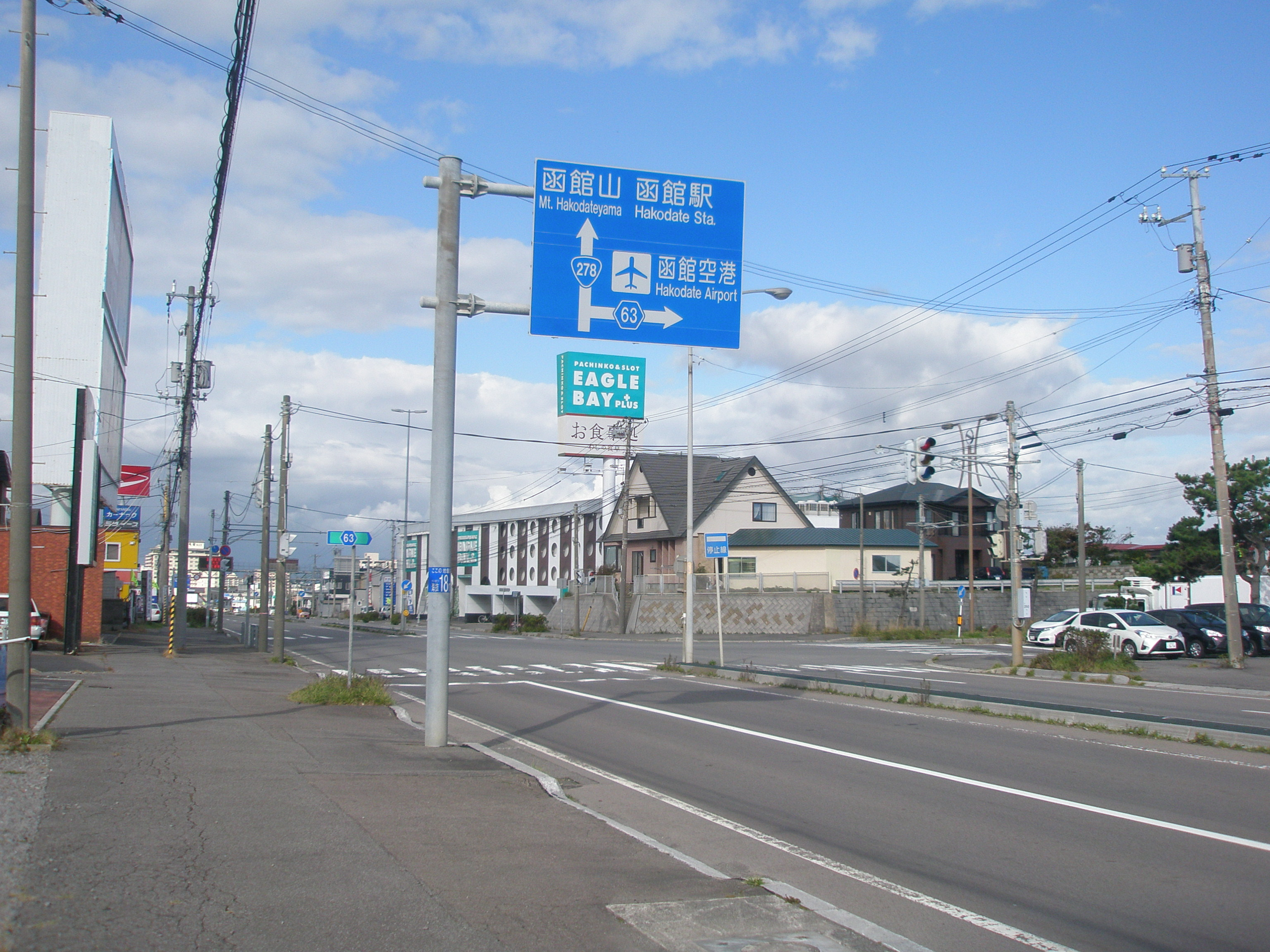 北海道道63号函館空港線・国道278号交点（国道278号終点側から）